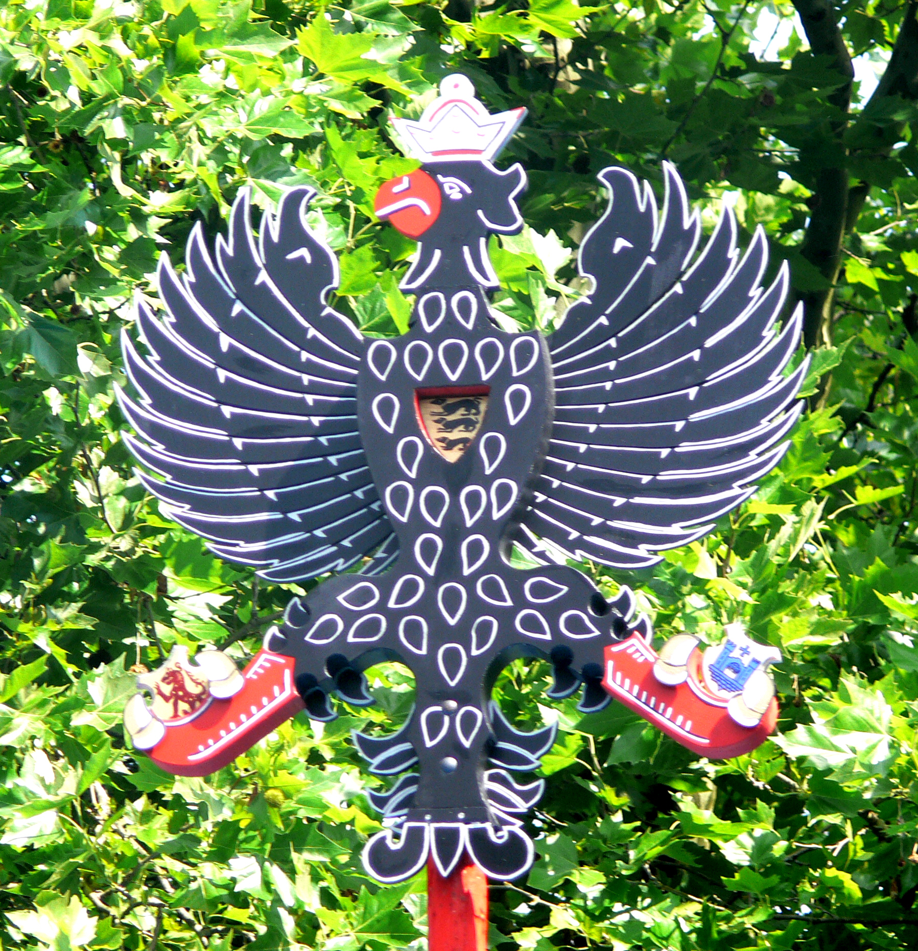 Rutenfest Ravensburg, Altenschießen 2010 (Adlerschießen der ehemaligen Gymnasiasten), Wappenadler Der Wappenadler enthält statt der Insignien Reichsapfel, Zepter und Herz jeweils das Wappen der Stadt Ravensburg, ein Welfenwappen und ein Humpis-Wappen.